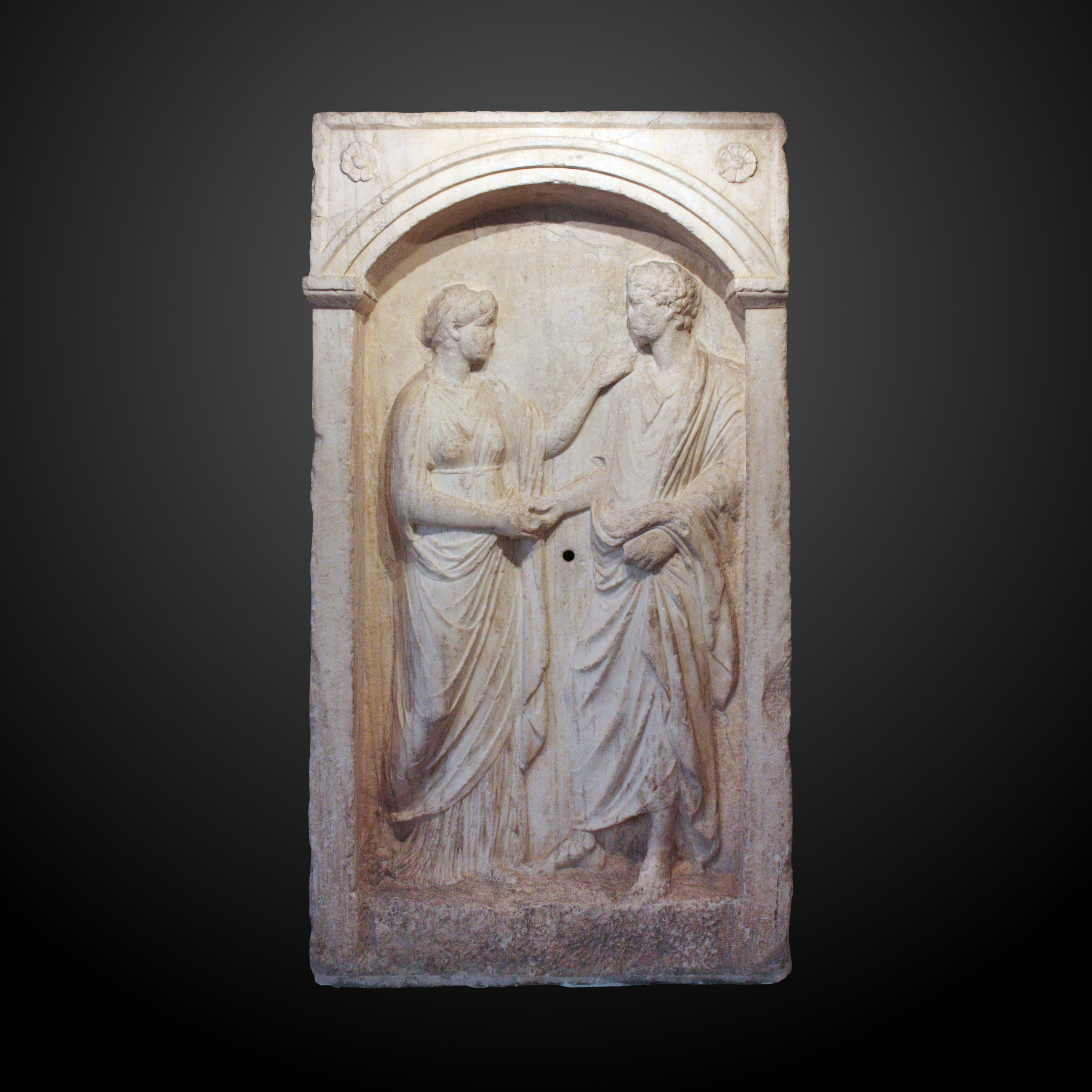 Stèle funéraire attique du IIe ou Ie siècle av. JC. Marbre, Athènes. Œuvre signée : Aristoclès, sculpteur rhodien. Don du Comte d'Albert de Rions, 1789.